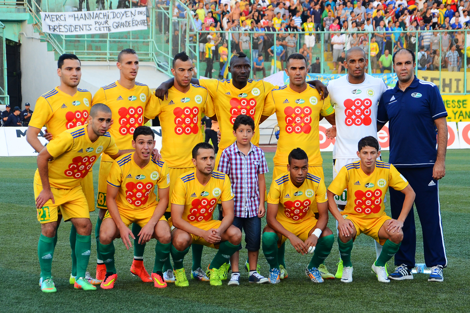 Photo d'équipe de la JS Kabylie avant un match de Ligue 1 contre l'USM Alger au stade du 1er-Novembre-1954 de Tizi Ouzou le 23 août 2014. Debout de gauche à droite : Ziti, Mekkaoui, Benlamri, Ebossé, Rial, Doukha. Accroupis de gauche à droite : Raïah, Aiboud, Delhoum, Moulay, Ferahi.